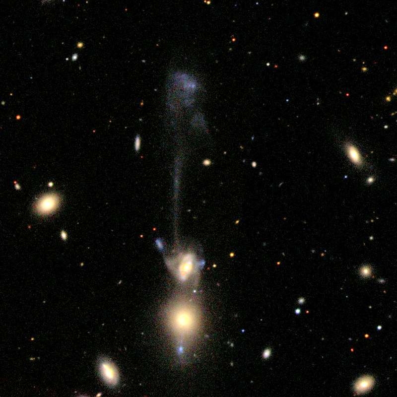 Abell 1185 (NGC 3561 - The Guitar)